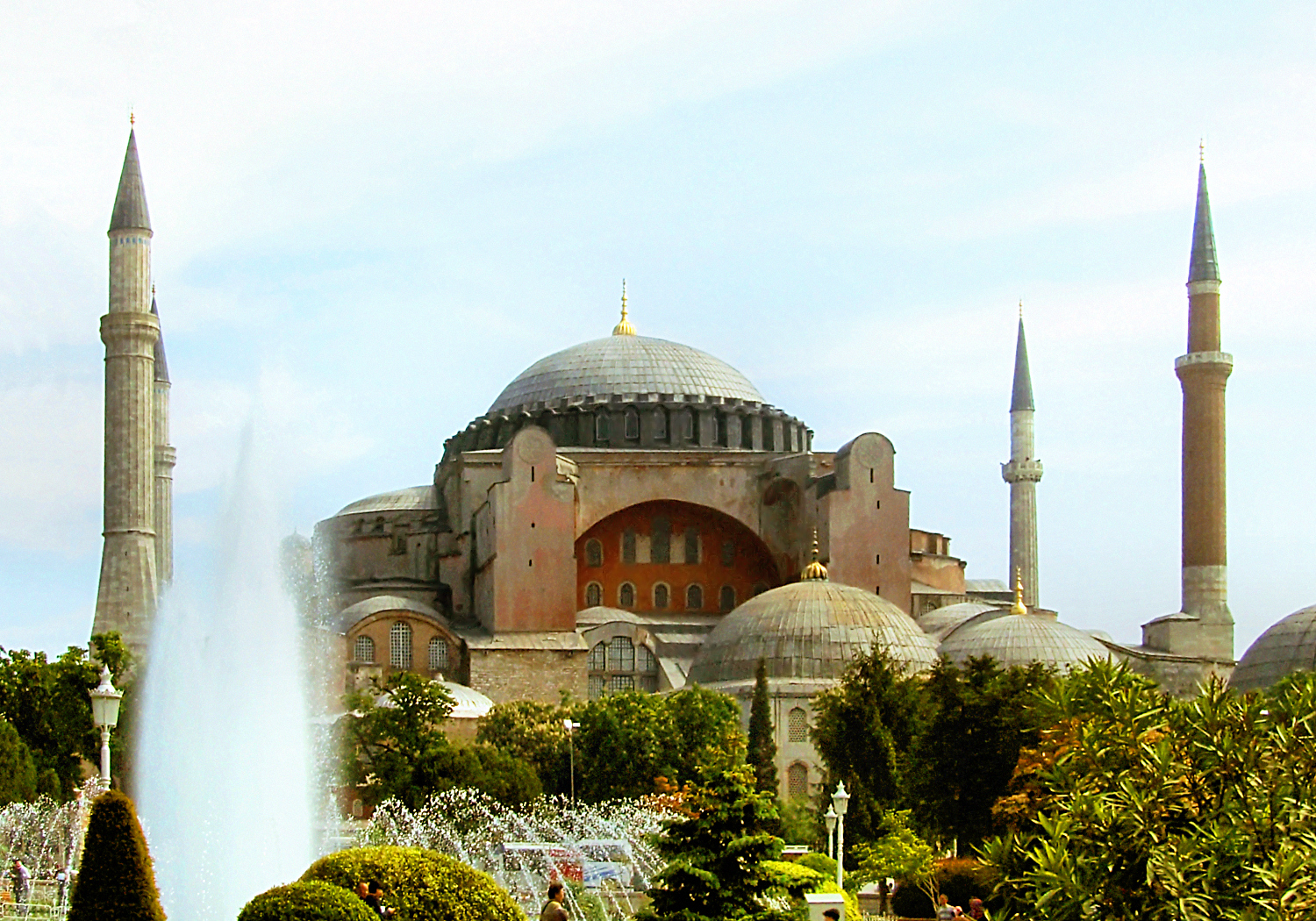 Stambuł, Hagia Sofia (Aya Sofya); Istambul, Hagia Sophia